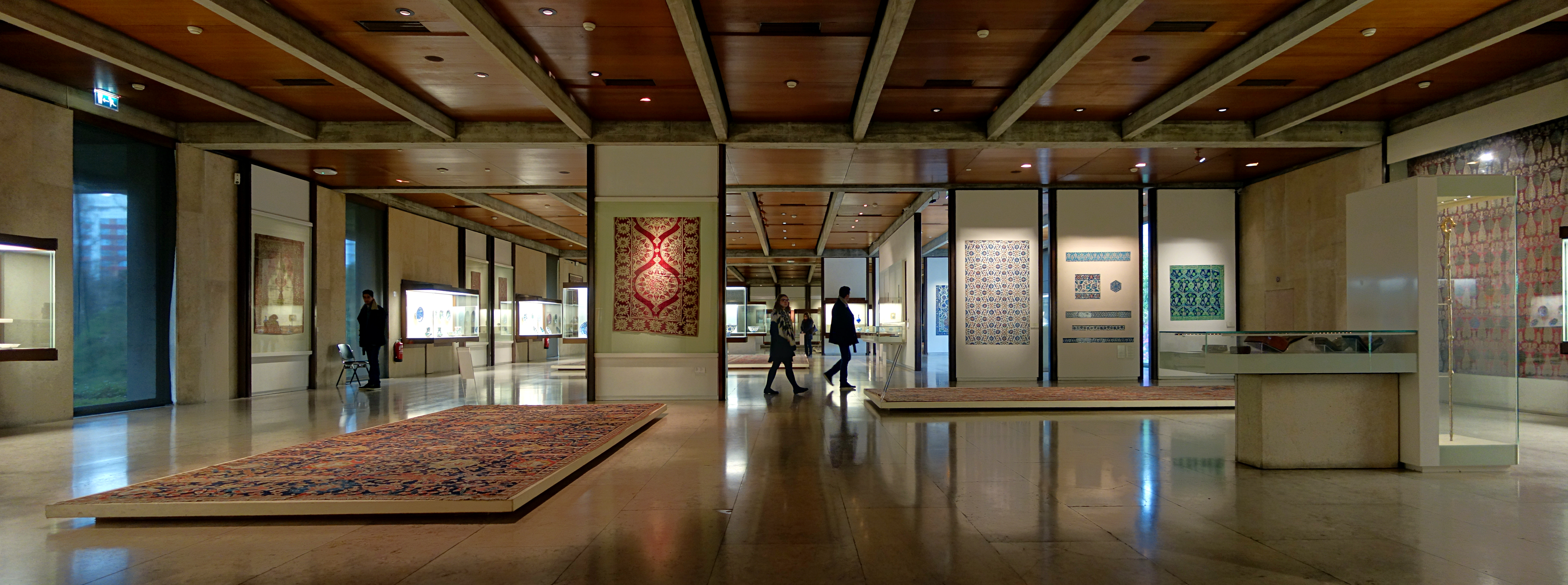 Salle de l'orient islamique au musée Gulbenkian de Lisbonne.